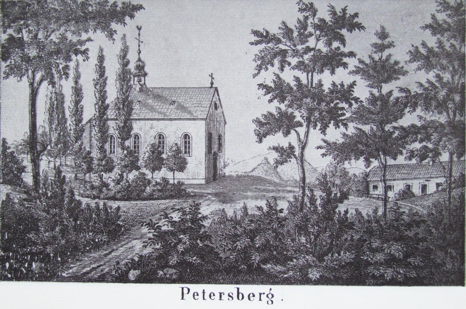 Petersberg mit Kapelle, die an die erste Klostergründung der Zisterzienser im Siebengebirge erinnert. Daneben ein Einkehrhaus für die wallfahrenden Pilger als schlichter Vorgängerbau des heutigen Hotelkomplexes